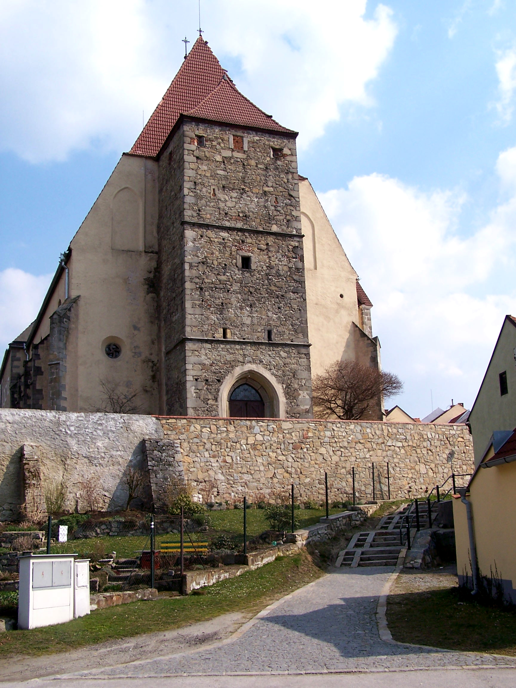 Kostel Nanebevzetí Panny Marie v Trhových Svinech ( původní stavba )